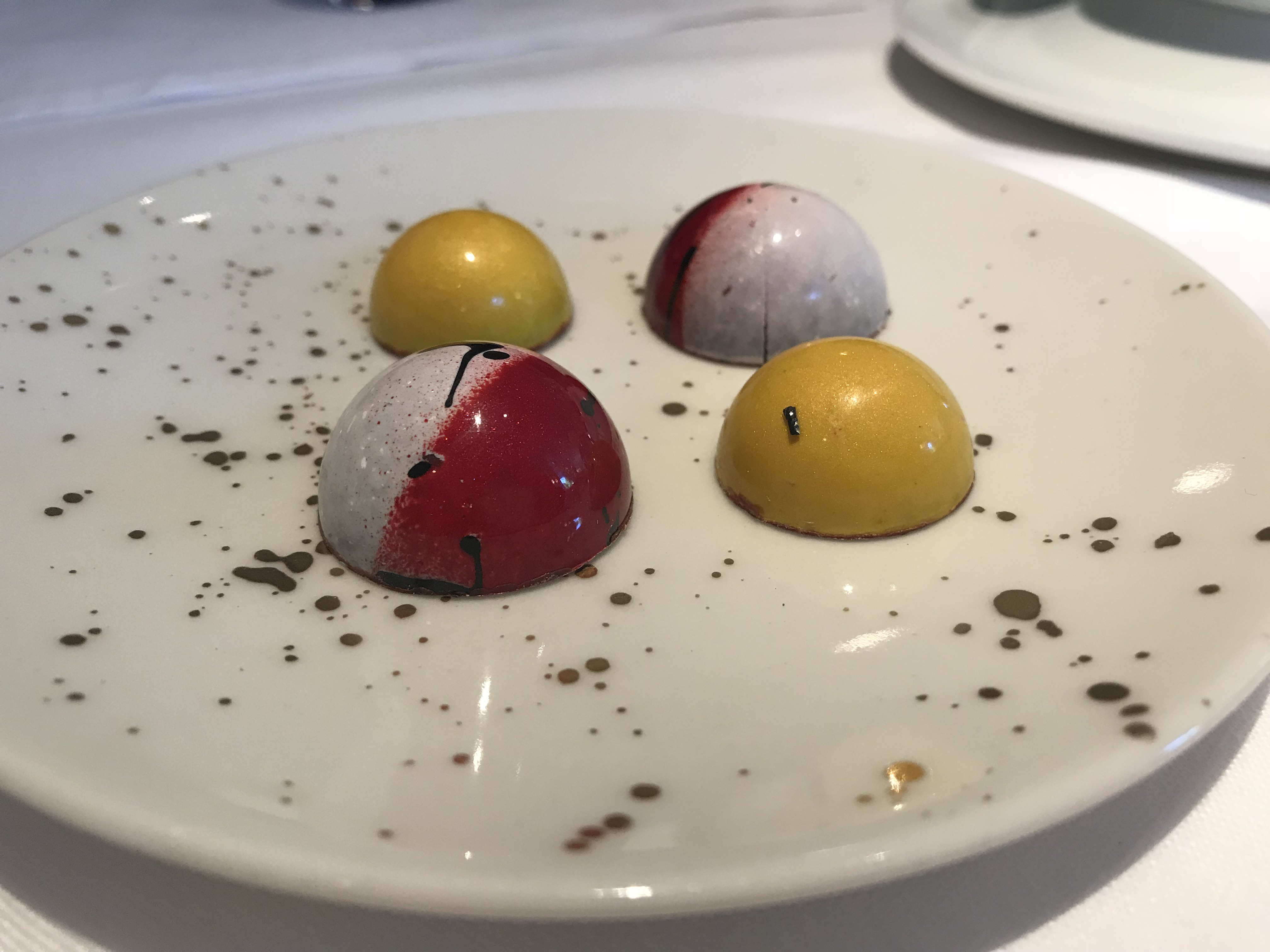 Maison Pic, petits chocolats.